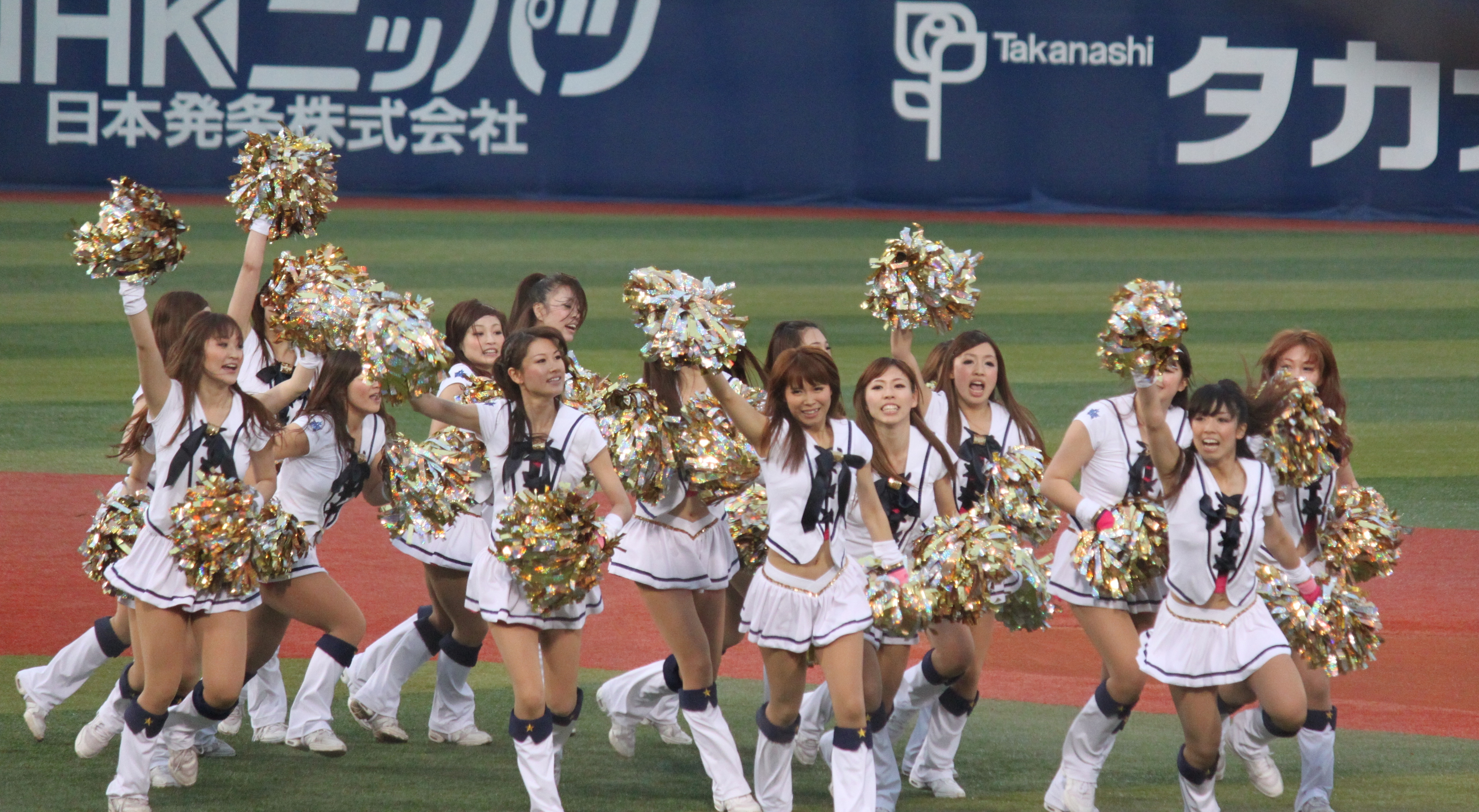 横浜DeNAベイスターズ・チアリーディングチームの "diana"。2012年5月1日、横浜スタジアムにて。